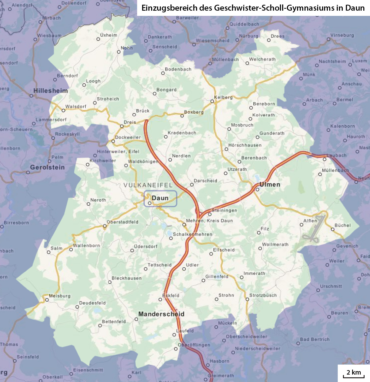 Einzugsbereich des Geschwister-Scholl-Gymnasiums in Daun